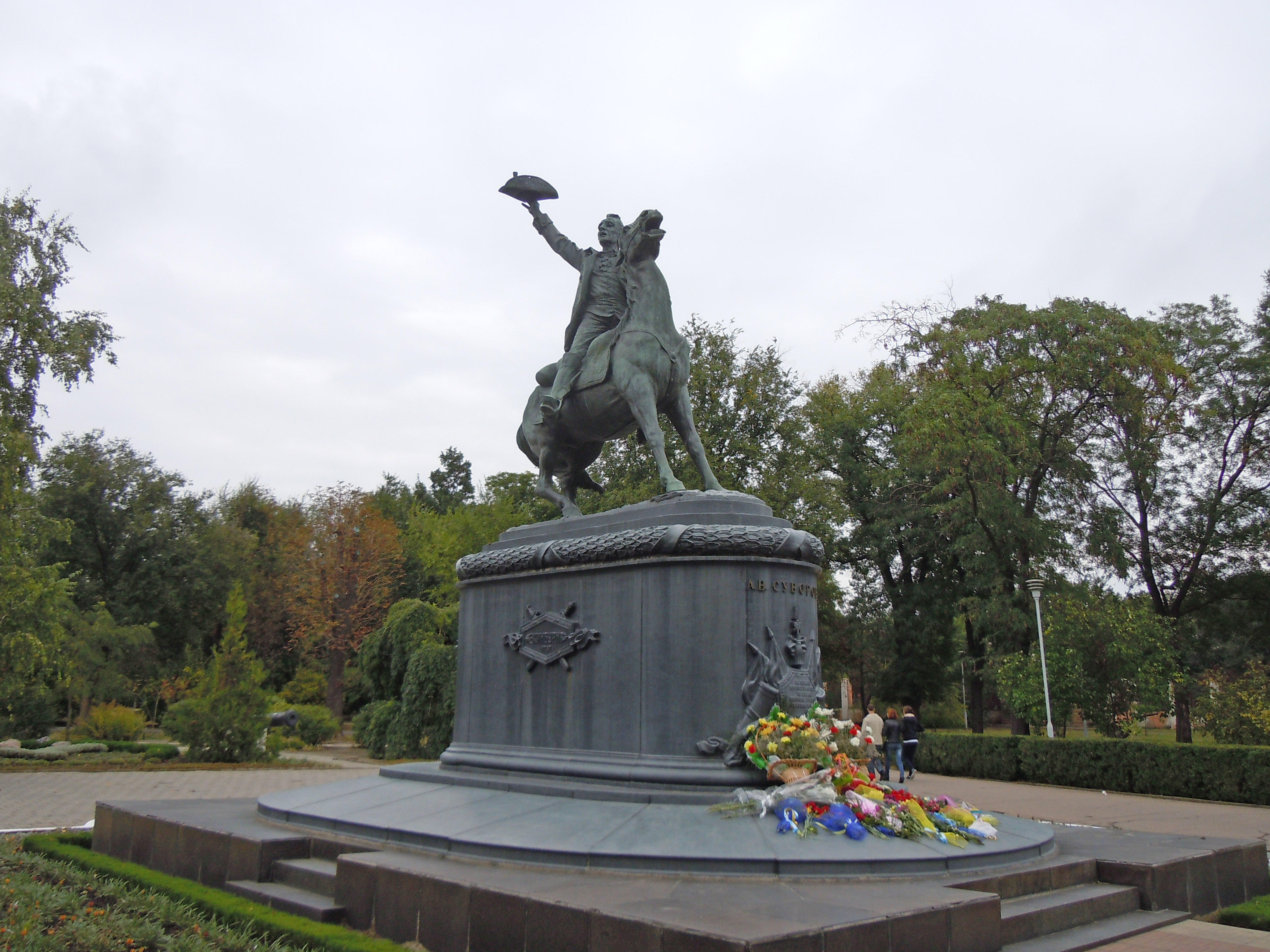 Пам'ятник російському полководцю О.В. Суворову, Ізмаїл, Суворова просп.